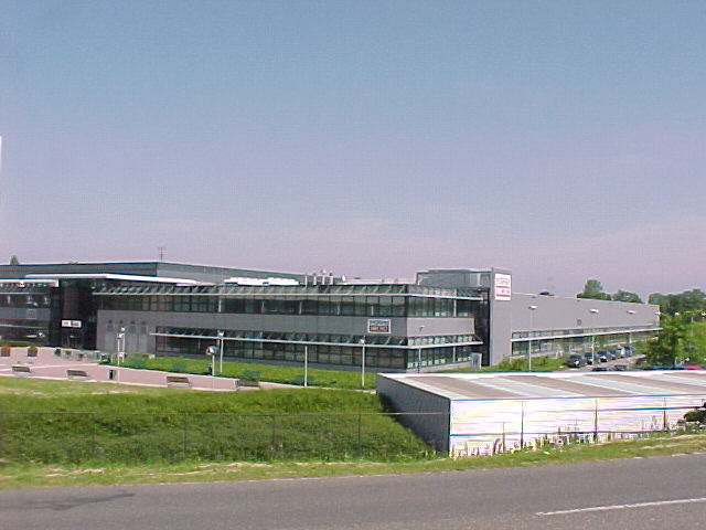 Ingram Micro fabriek (voormalig Tulip Computers) in Rosmalen - Noord Brabant Categorie:Afbeelding Rosmalen